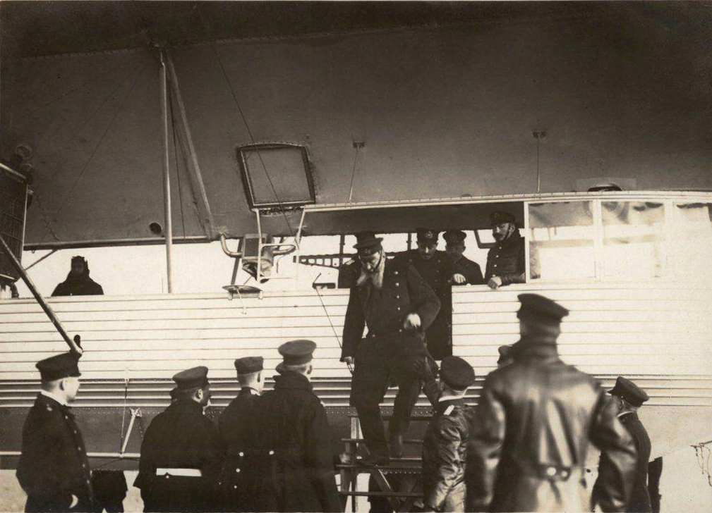 Großadmiral von Tirpitz nach einer Fahrt mit dem Marineluftschiff L 1.